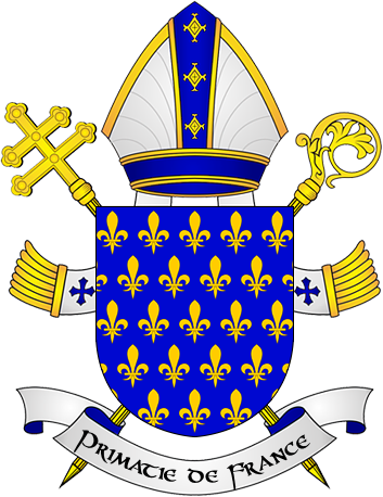 Blason- primatie de France (Lyon).